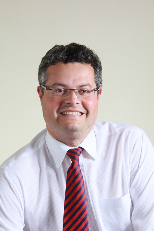 Alcalde de Linares, militante del Partido Unión Demócrata Independiente.